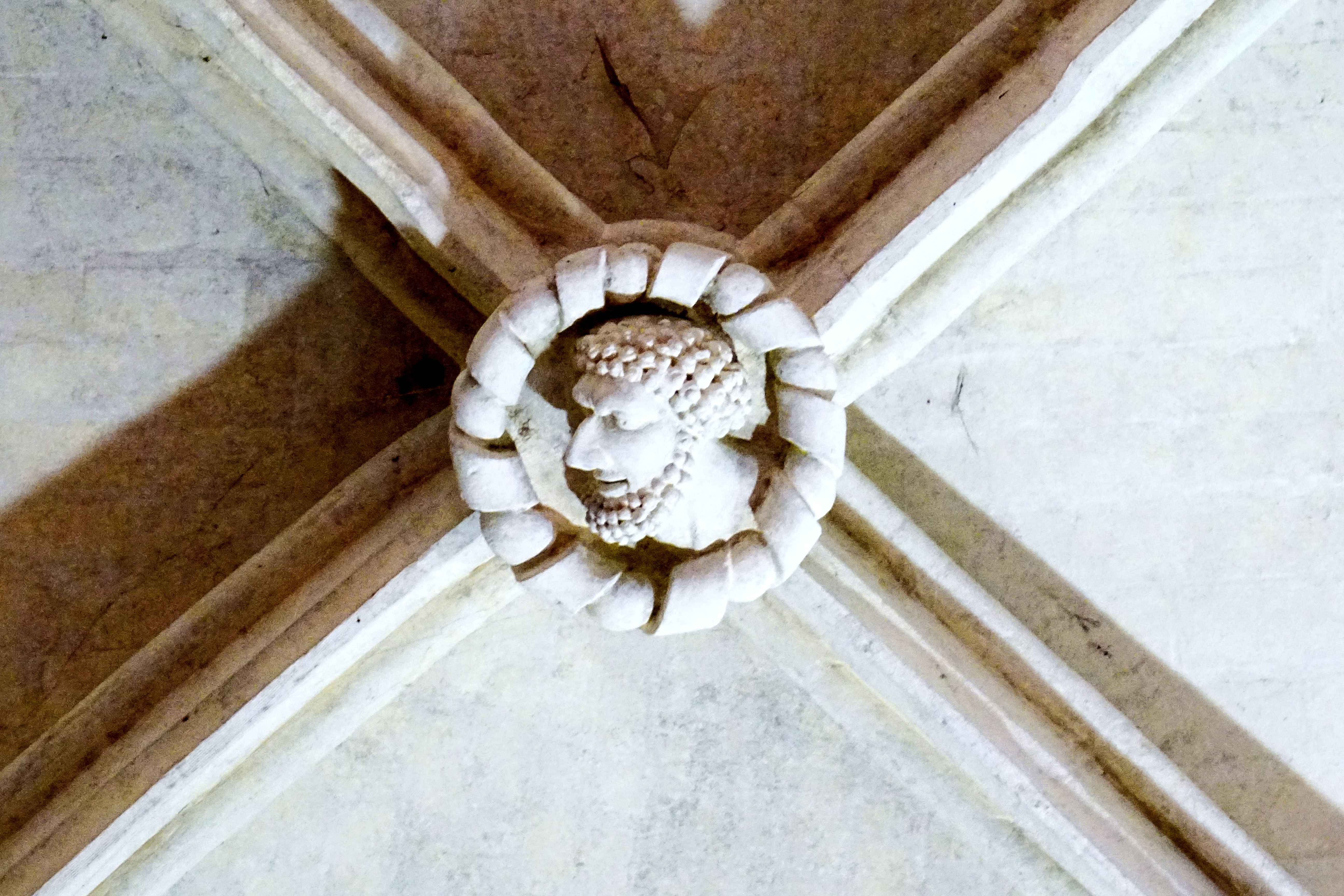 Clé de voûte - voir le titre du fichier.